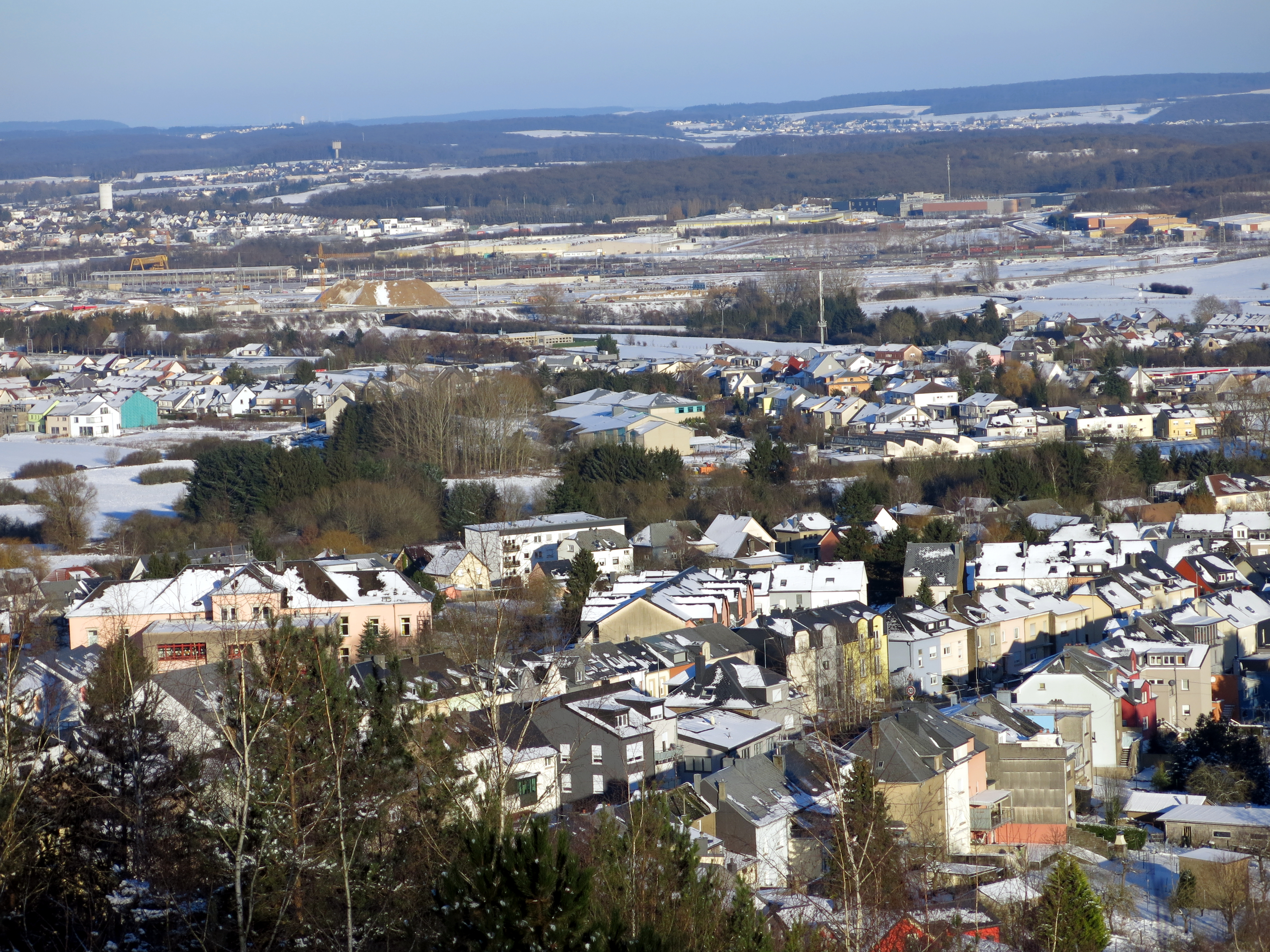 Vue op Butschebuerg vum "Tipp" op der Haard.